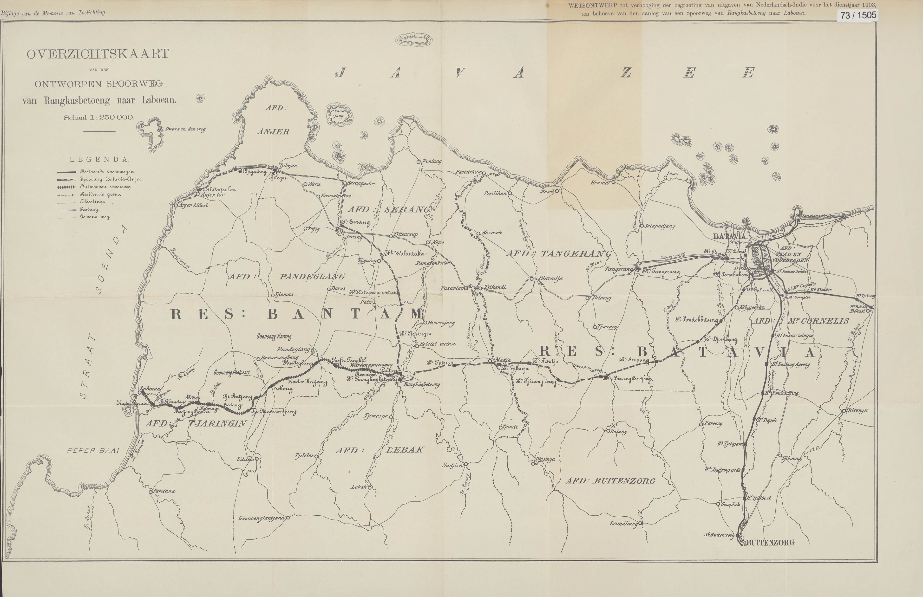 Behoort bij het wetsontwerp tot verhooging der begrooting van uitgaven van Nederlandsch-Indi voor het dienstjaar 1903, ten behoeve van den aanleg van een spoorweg van Rangkasbetoeng naar Laboean